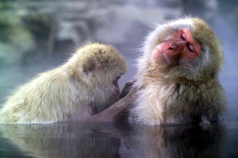 Japanese macaque Macaca fuscata Jigokudani Onsen, Yamanouchi, Nagano Prefecture, Japan